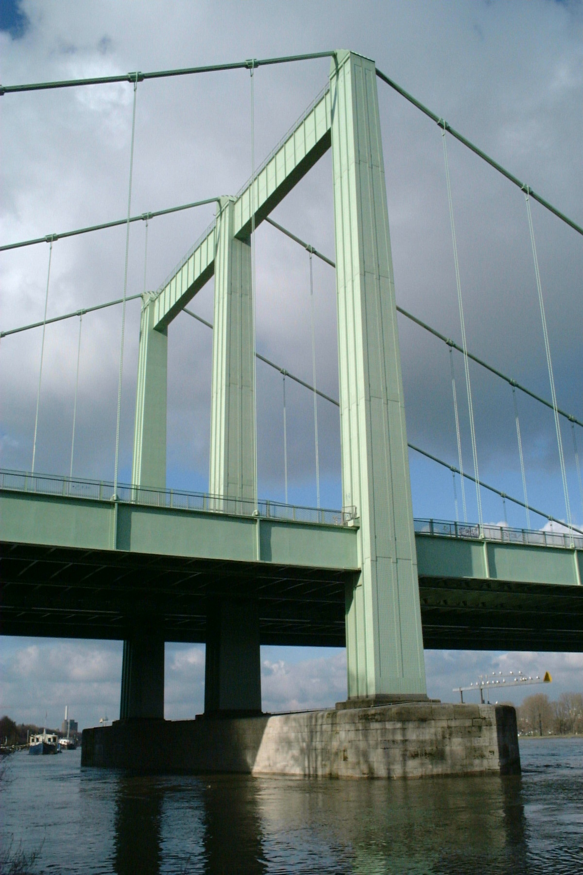 Rodenkirchener Autobahnbrücke der A4 südlich von Köln. This is a photograph of an architectural monument.